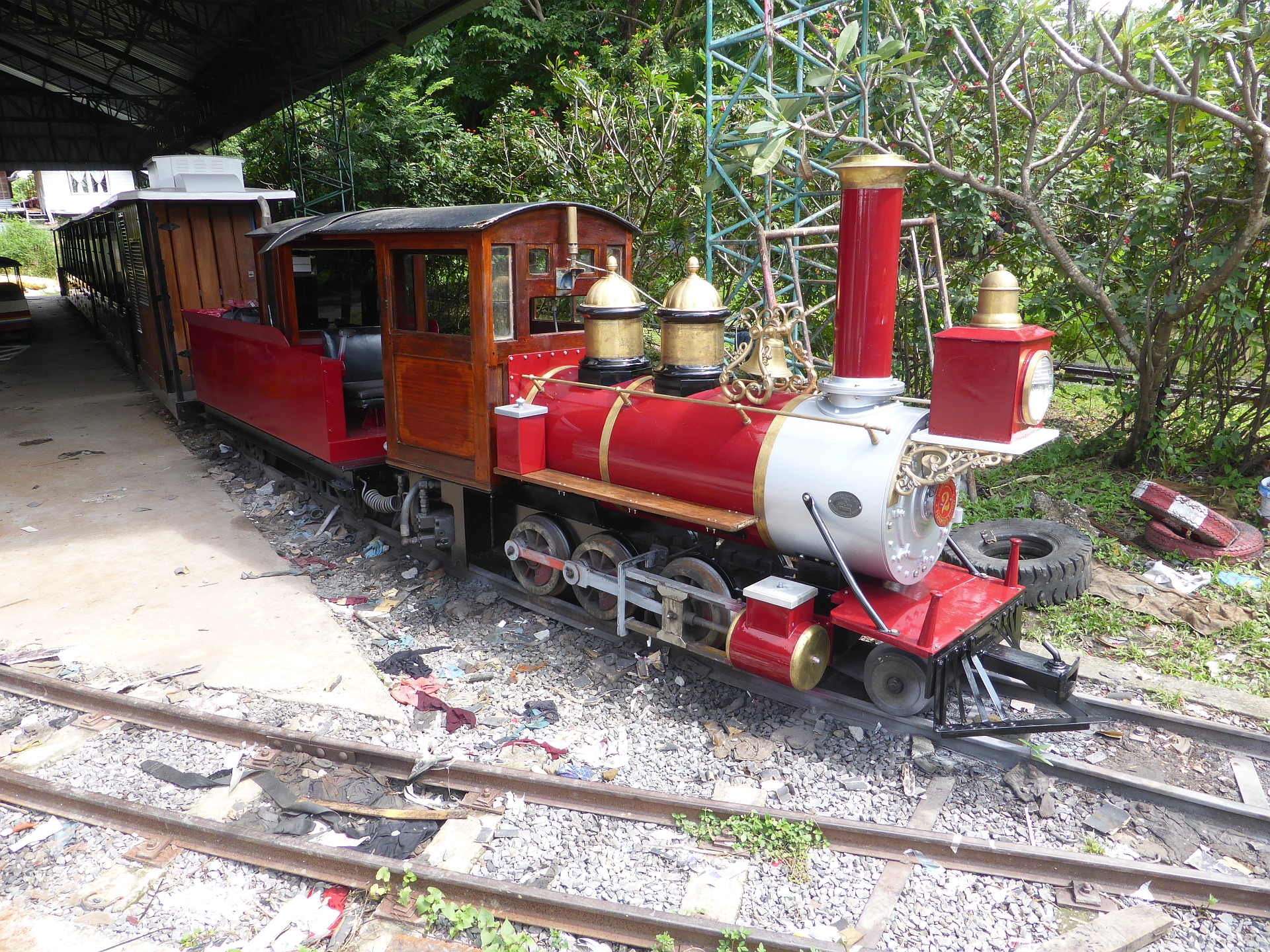 Siam Park City, Bangkok, 10.11.2016